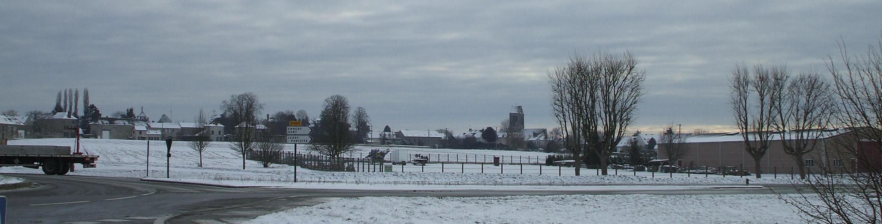 vue d'hérouville